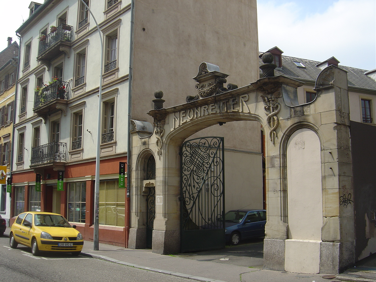 vue de l'extérieur du CEAAC